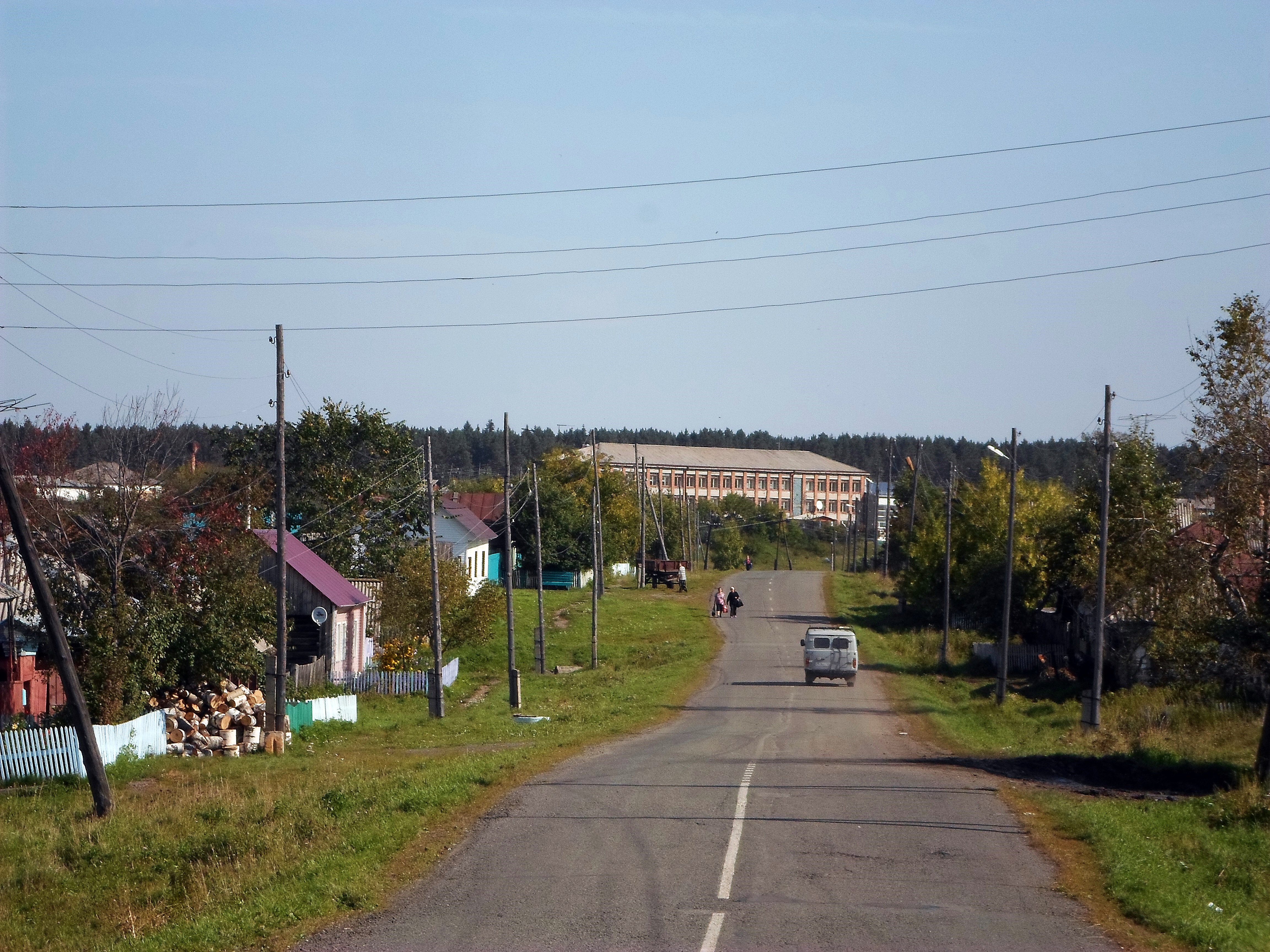 Село Вагино Боготольского района Красноярского края. Советская улица.